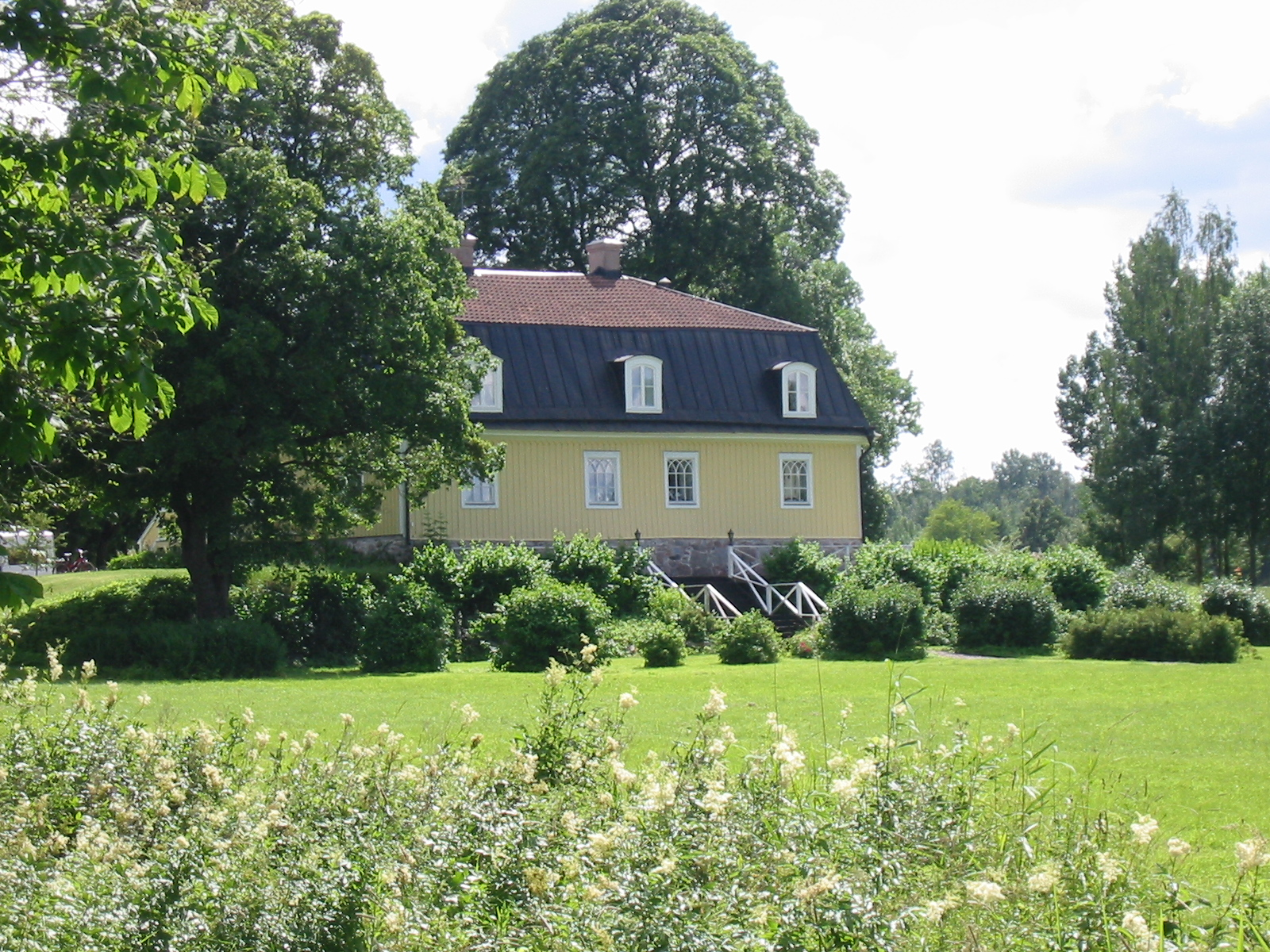 Baksidan av Lagersbergs herrgård, Västerås kommun